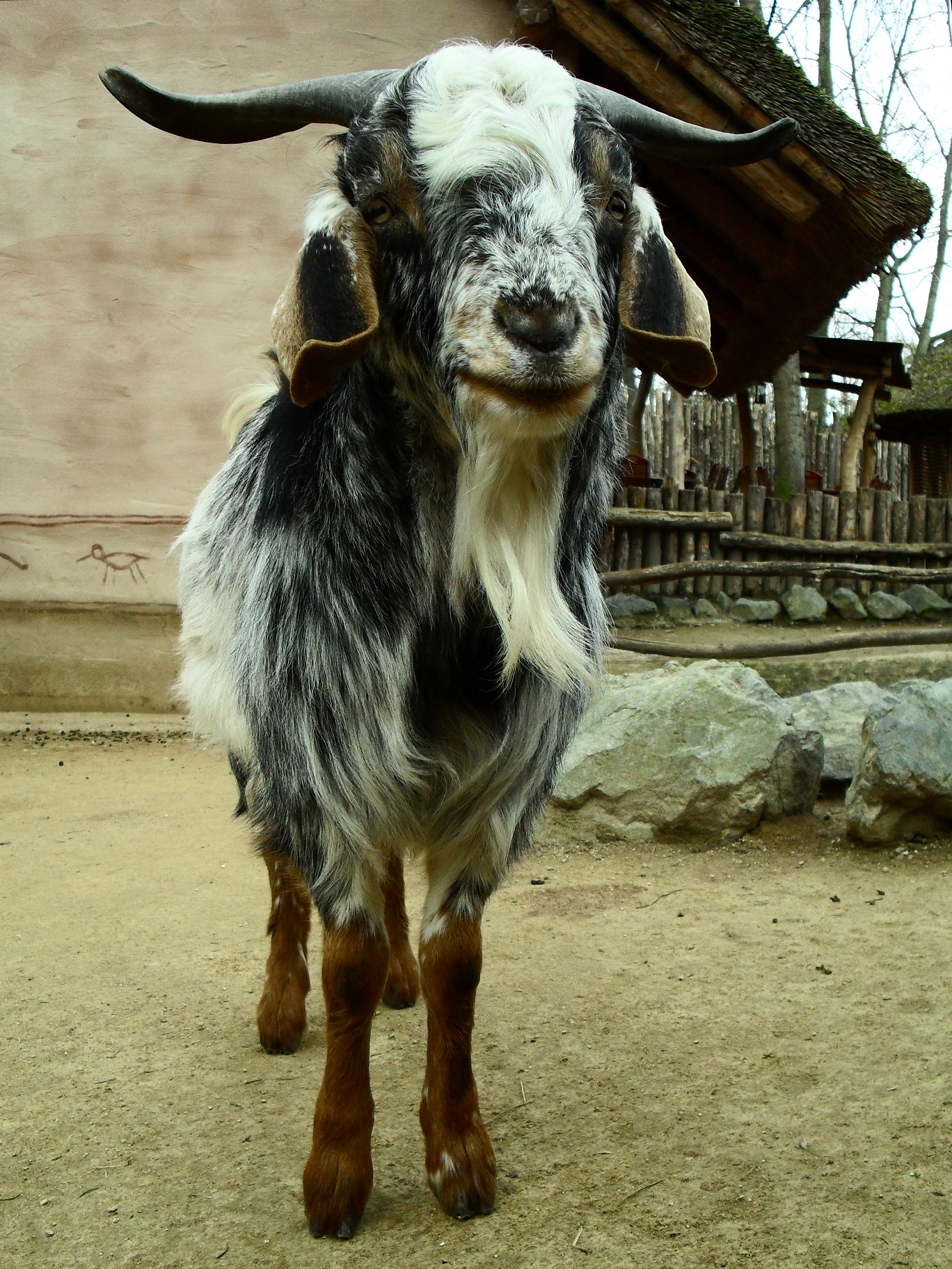 Capra aegagrus f. hircus (Damaraziege) - Zoo Leipzig